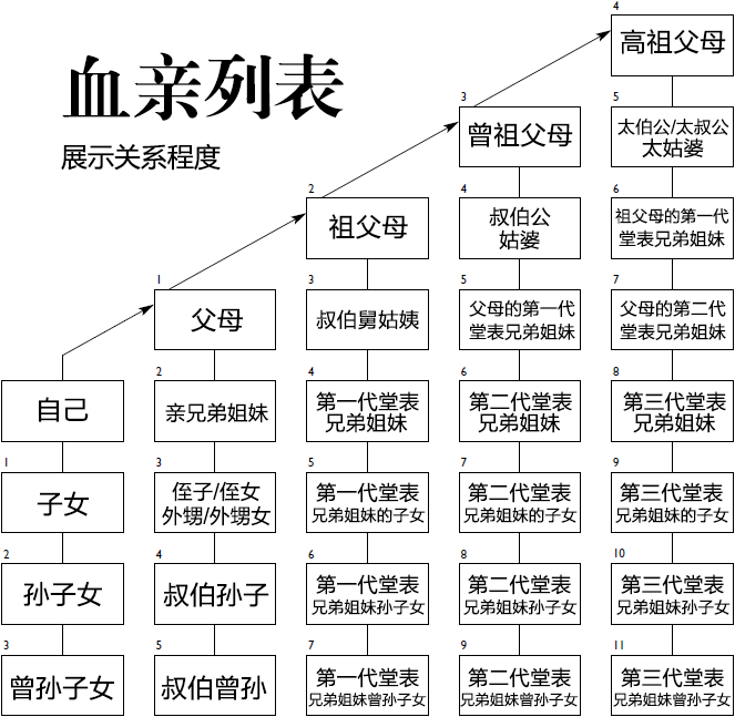 展示关系程度的血亲列表（简体中文）